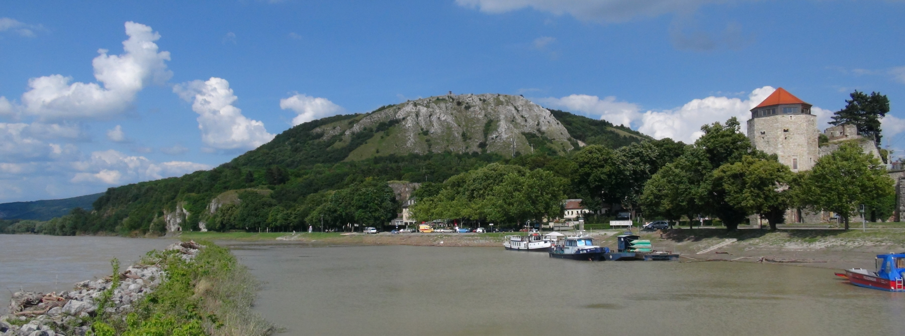 Hainburg an der Donau in Niederösterreich: Behördenhafen, Wasserturm und Braunsberg